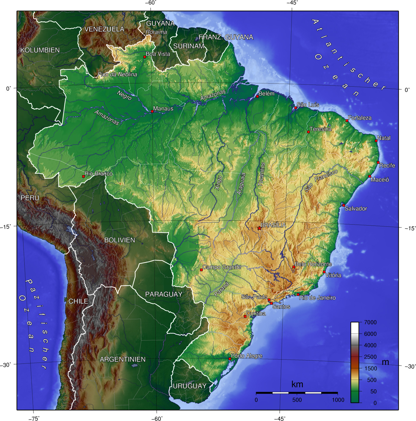 Topografische Karte von Brasilien